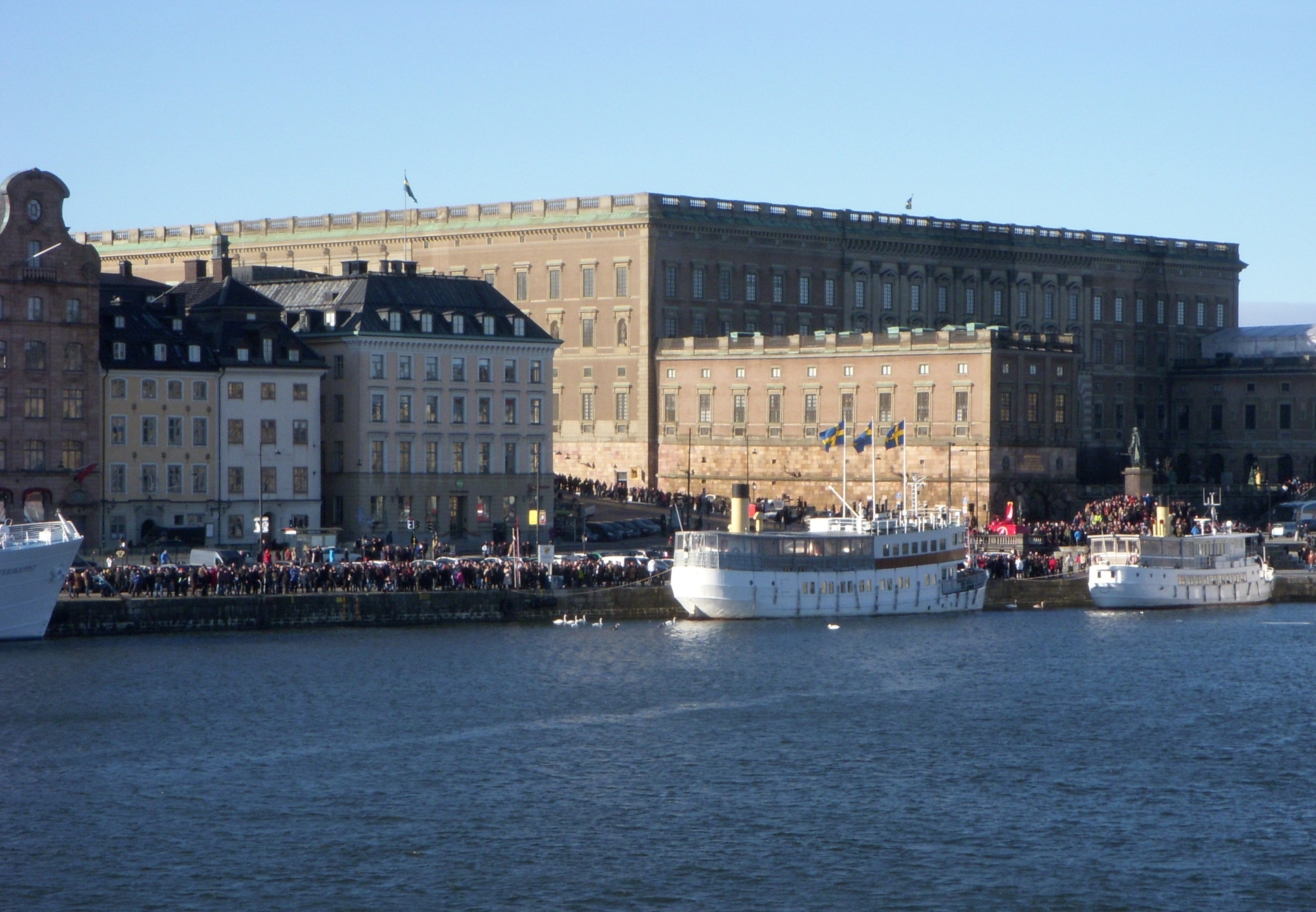 Salut från Skeppsholmen, Prinsessan Estelle är född